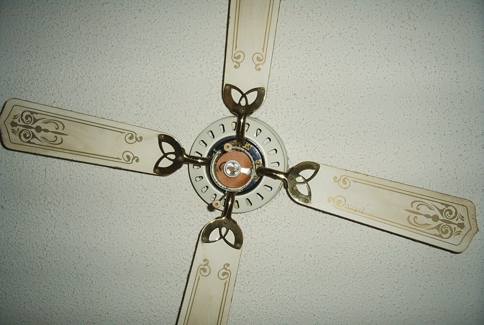 A ceiling fan